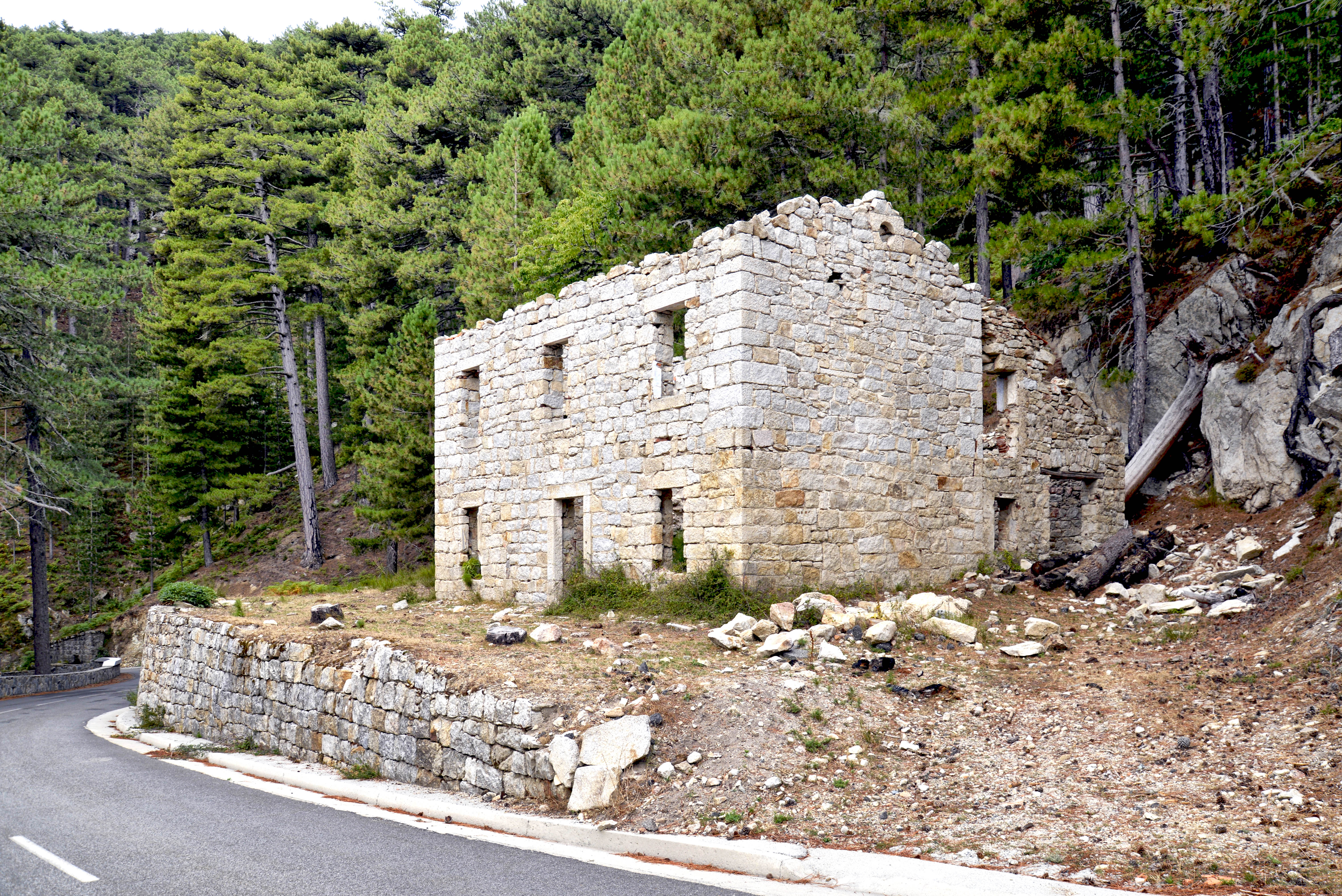 Ghisoni, Fiumorbo (Corse) - Ruines de l'ancienne maison cantonnière de Sorba (1234 m), proche du col de Sorba